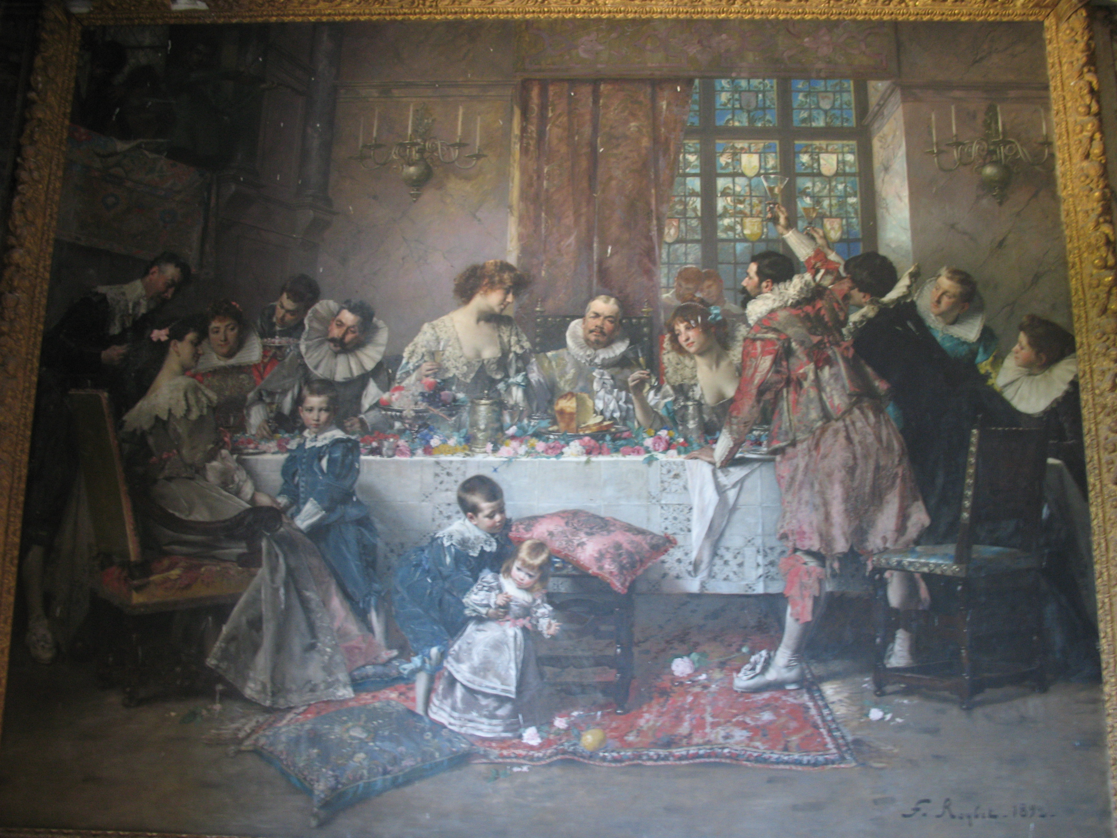 Château de La Boissière, à La Boissière-École dans les Yvelines (Le banquet des Hériot, par Ferdinand Roybet)